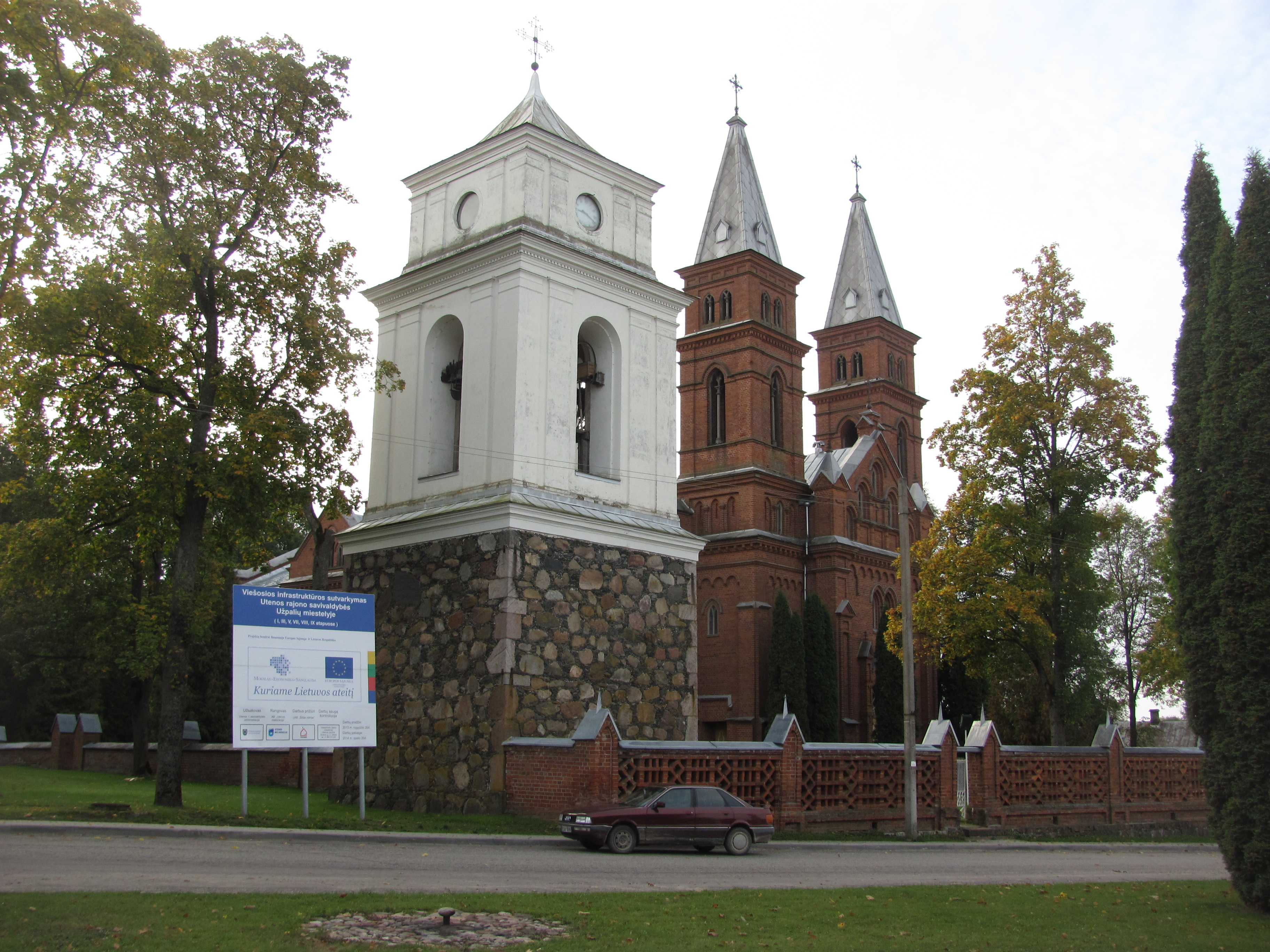 Užpaliai, Lithuania